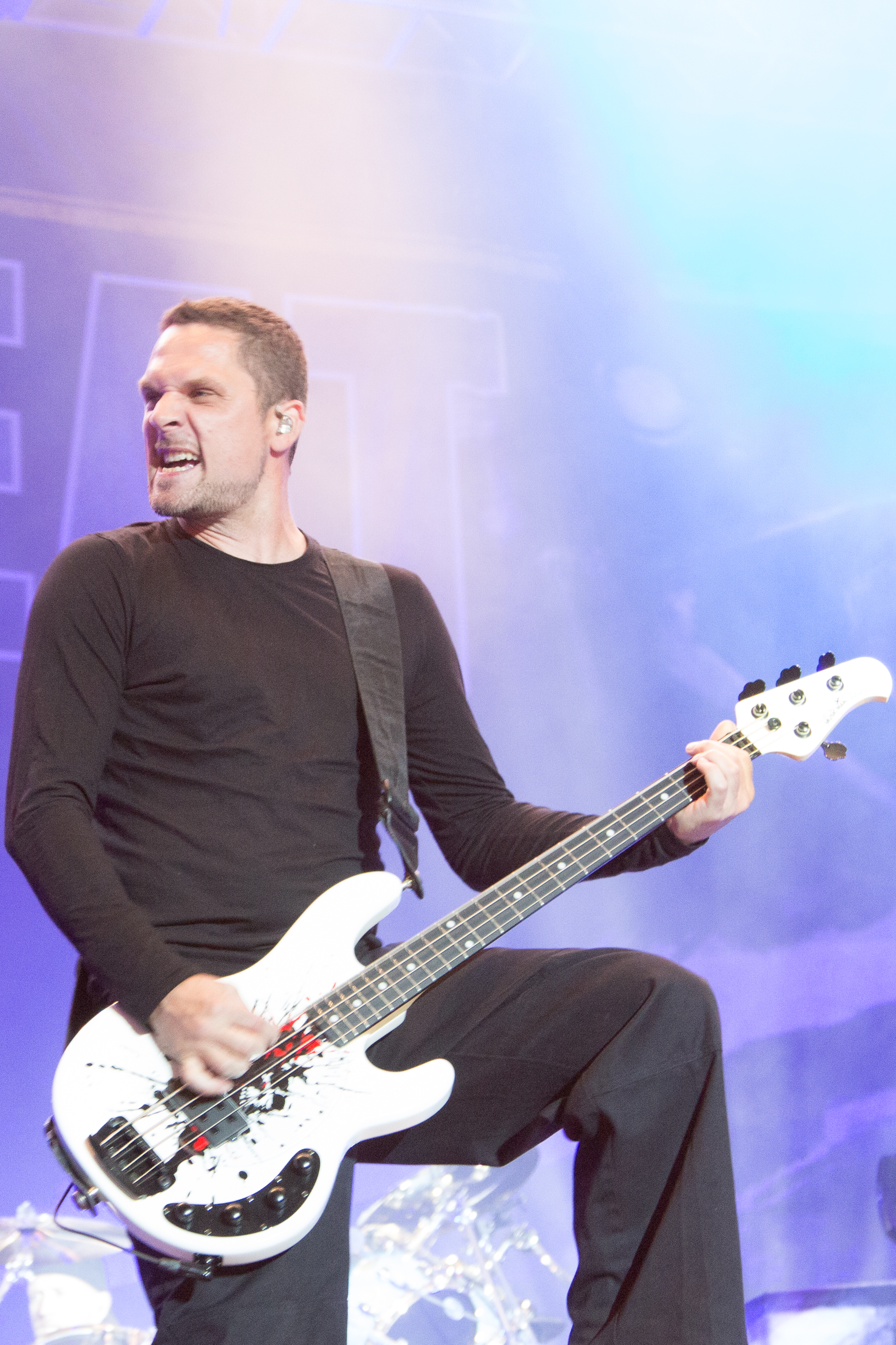 Anders Kjølholm from Volbeat at Nova Rock 2014